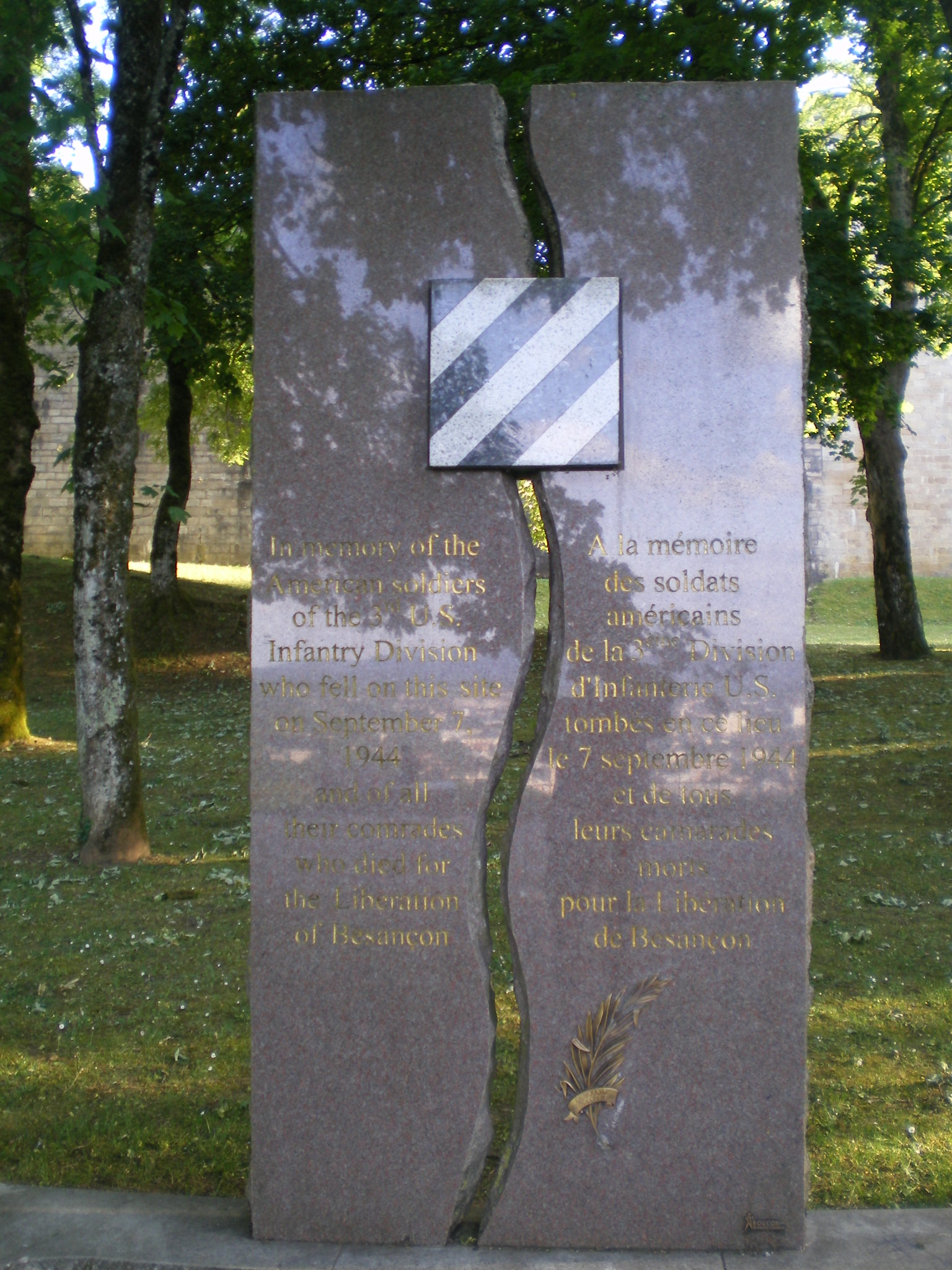 Mémorial